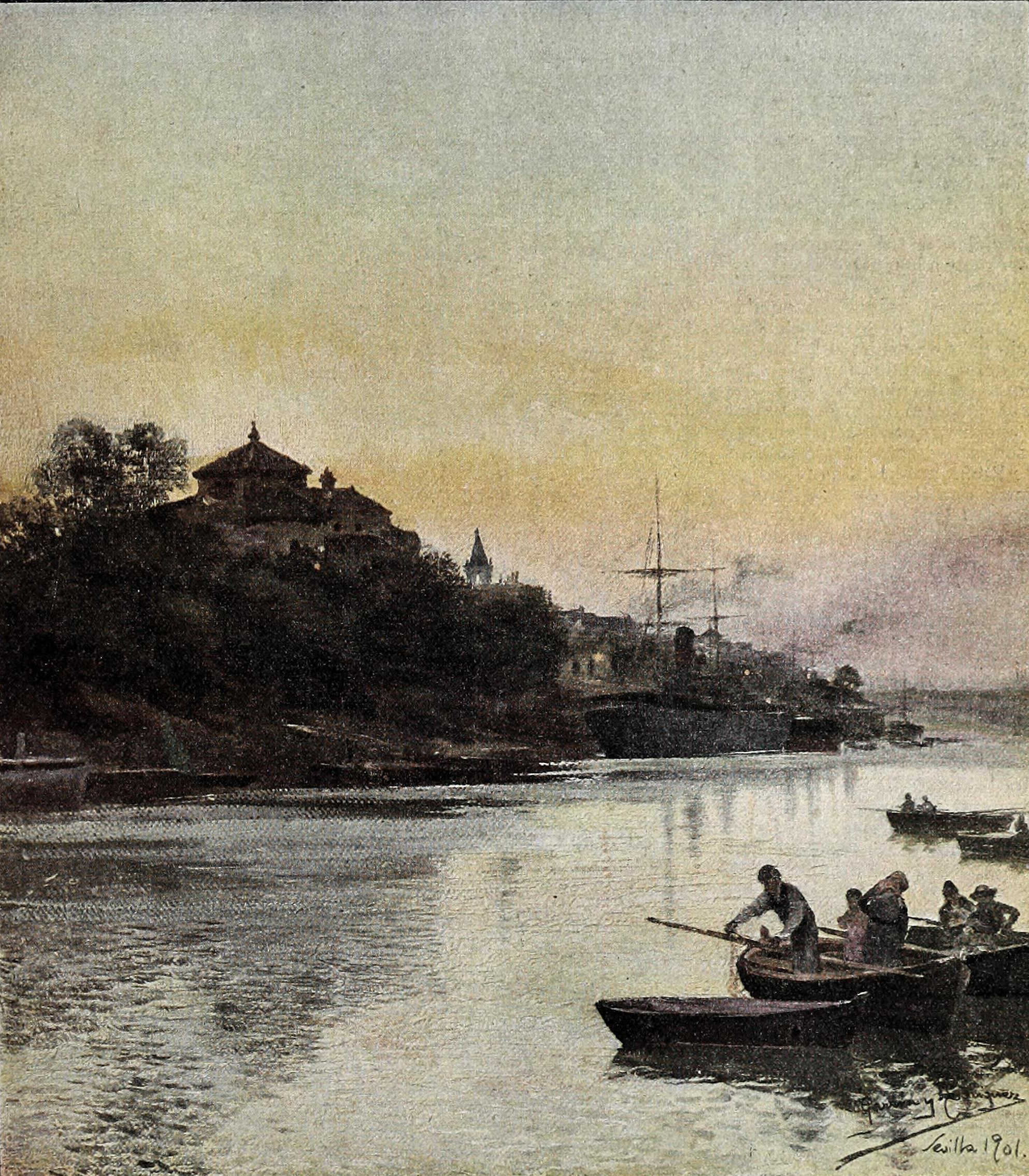 Guadalquivir.